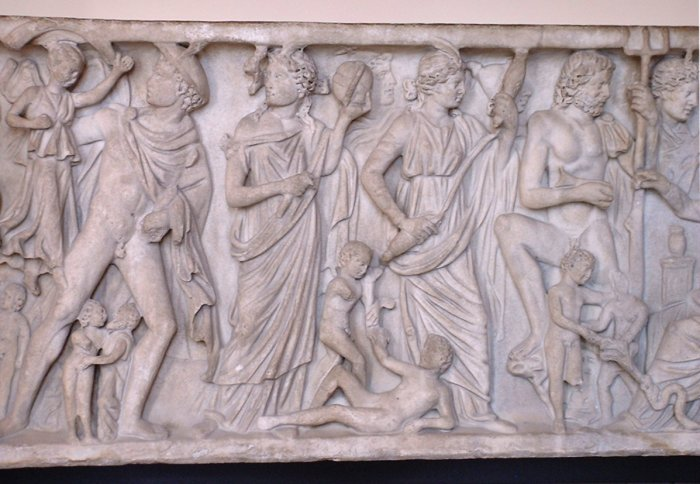 Los ayudantes de los dioses olímpicos, detalle de un bajorrelieve, sarcófago griego, c. 240 adC (Museo del Louvre)